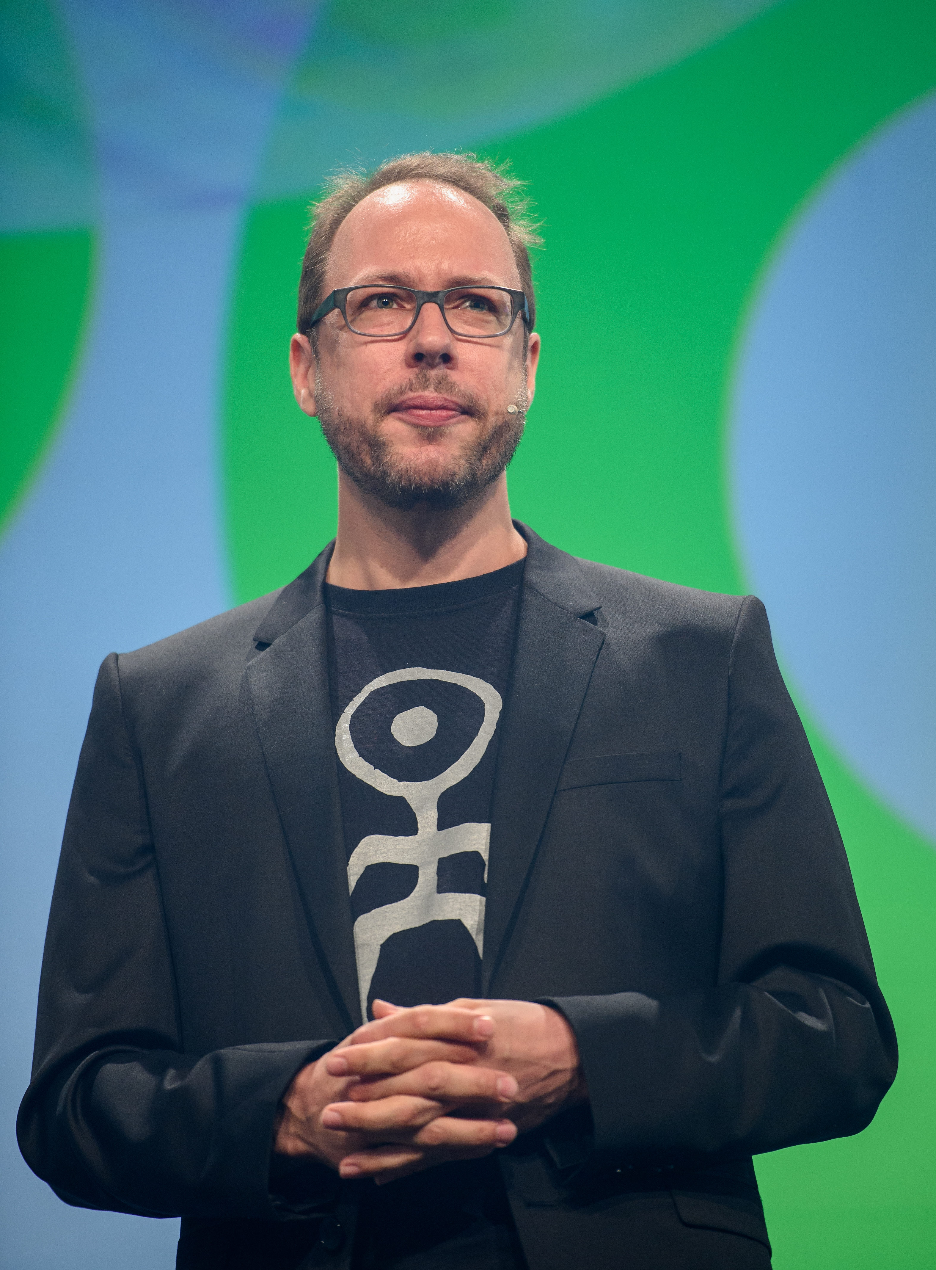 02.05.2018, Berlin: Action: Welcome Everybody Speaker: Markus Beckedahl. Die re:publica ist eine der weltweit wichtigsten Konferenzen zu den Themen der digitalen Gesellschaft und findet in diesem Jahr vom 02. bis 04. Mai in der STATION-Berlin statt. Foto: Gregor Fischer/re:publica